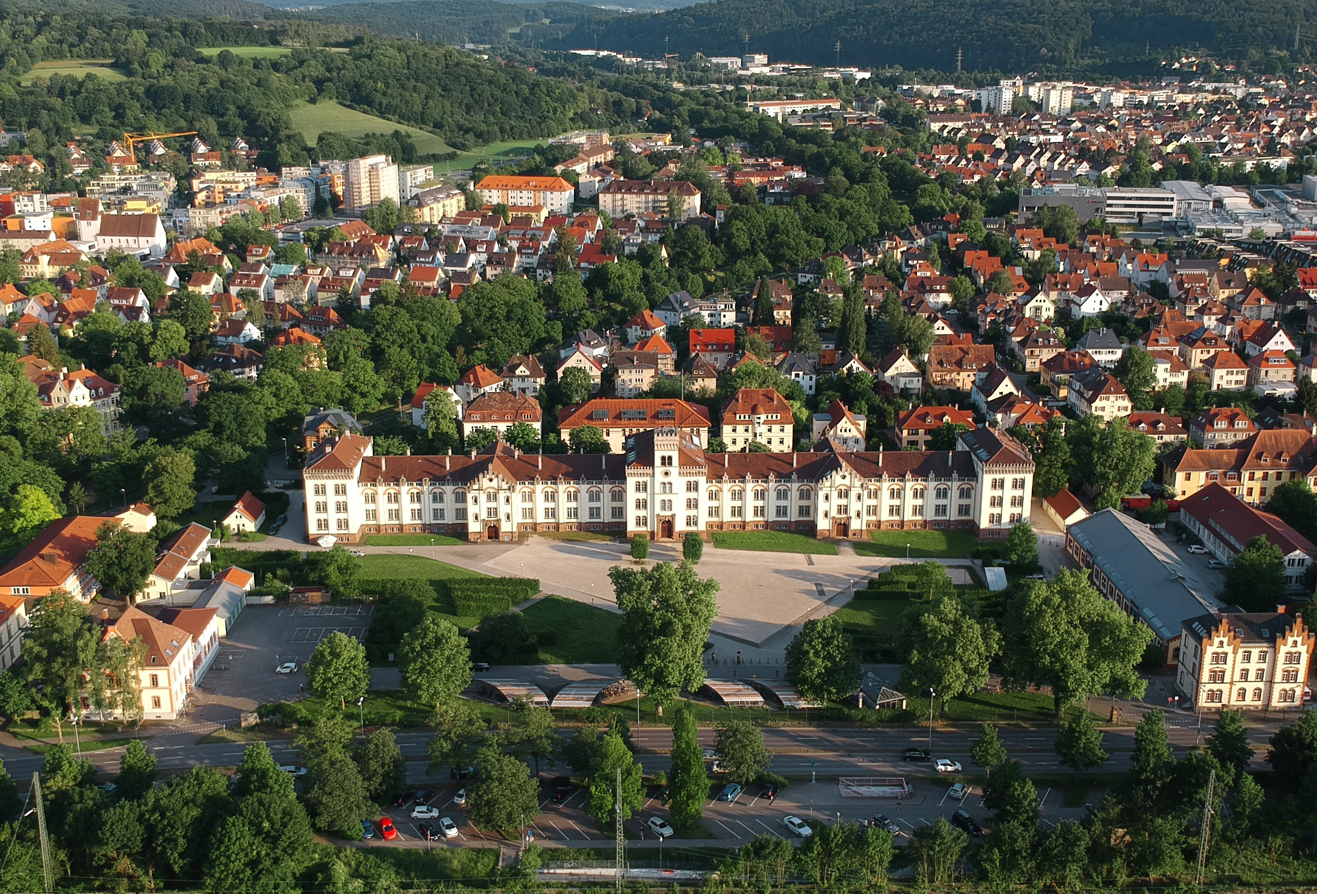 Tübingen. Thiepval-Kaserne mit Blick auf die Südstadt und Derendingen.